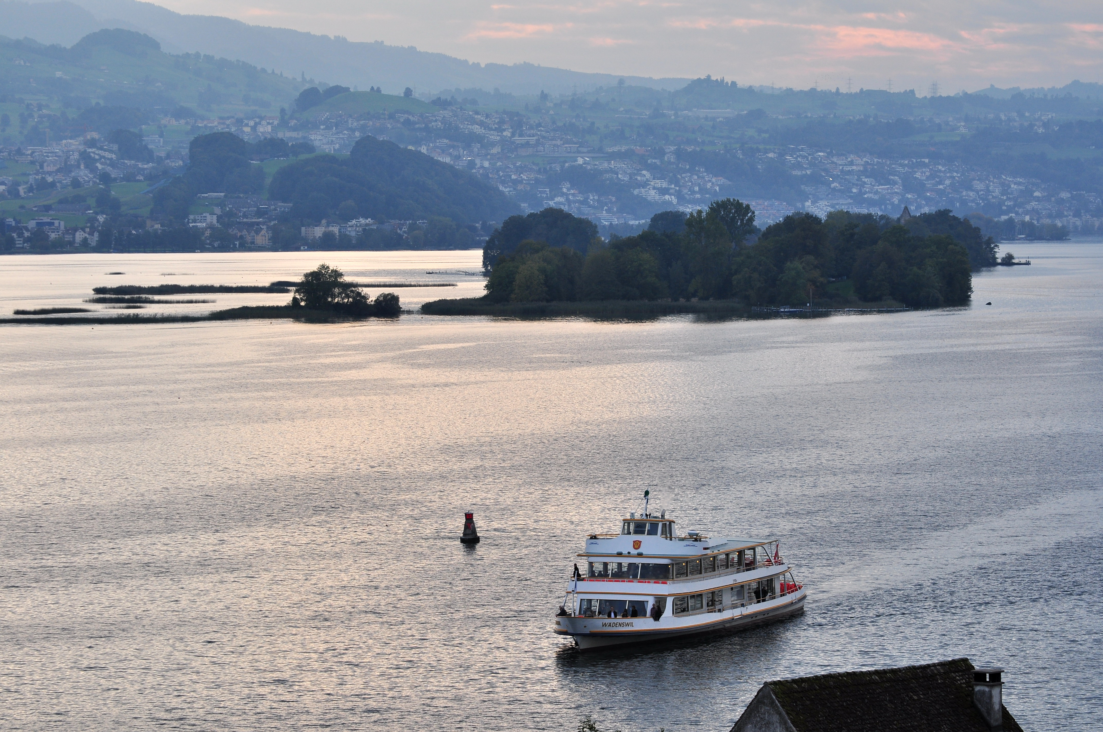 Lützelau and Ufenau islands, as seen from Lindenhof hill in Rapperswil (Switzerland), Freienbach (to the left), Wollerau and Zimmerberg (to the right) in the background, Zürichsee-Schifffahrtsgesellschaft (ZSG) MS Wädenswil arriving in Rapperswil harbour.